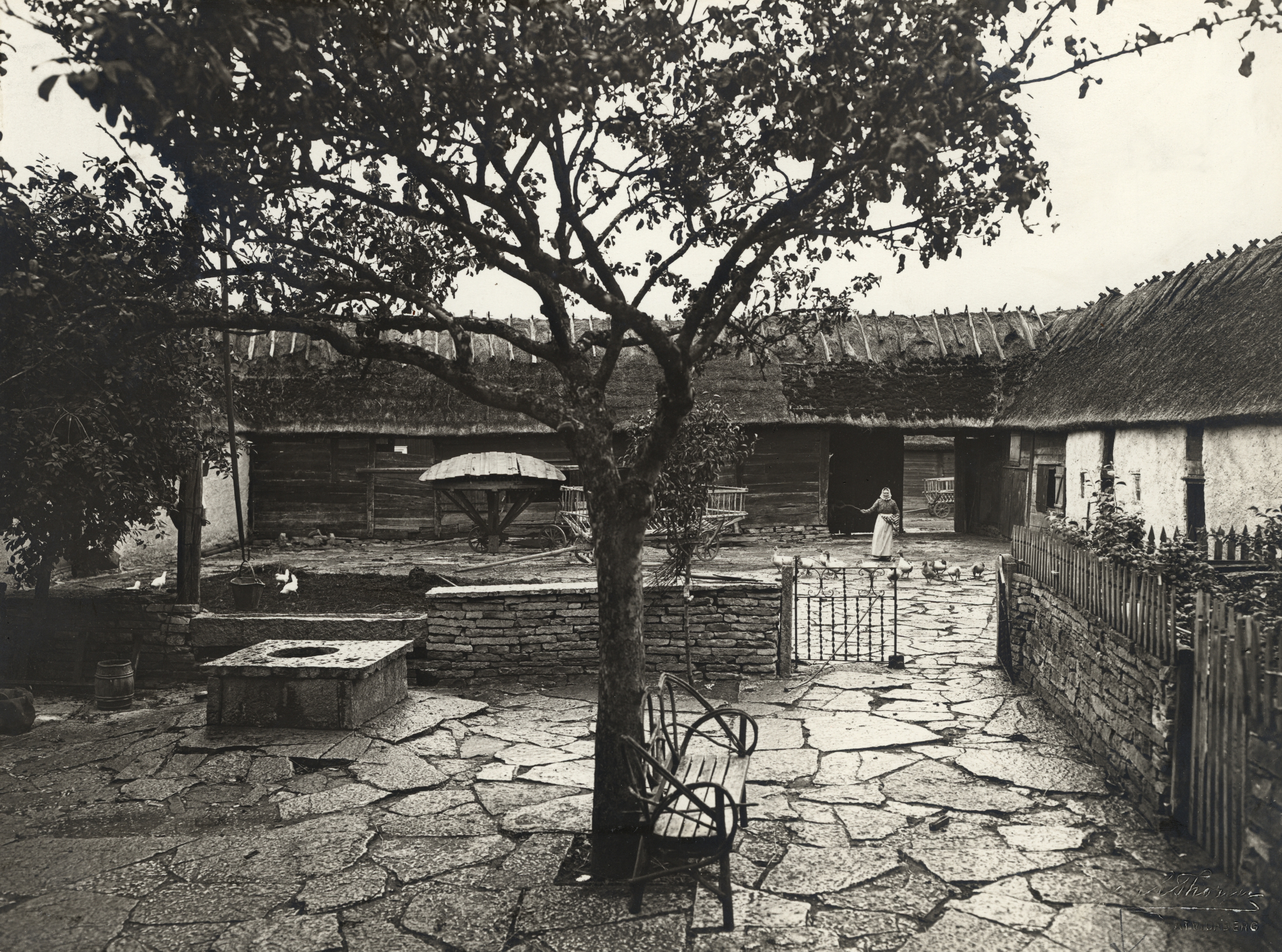 Öland, Möckleby hd, Hulterstads sn, Triberga. Gårdsinteriör från Triberga 1906 (Hela gården nedbrunnen omk. 1925). Vagnar, höns,brunn och spannar.